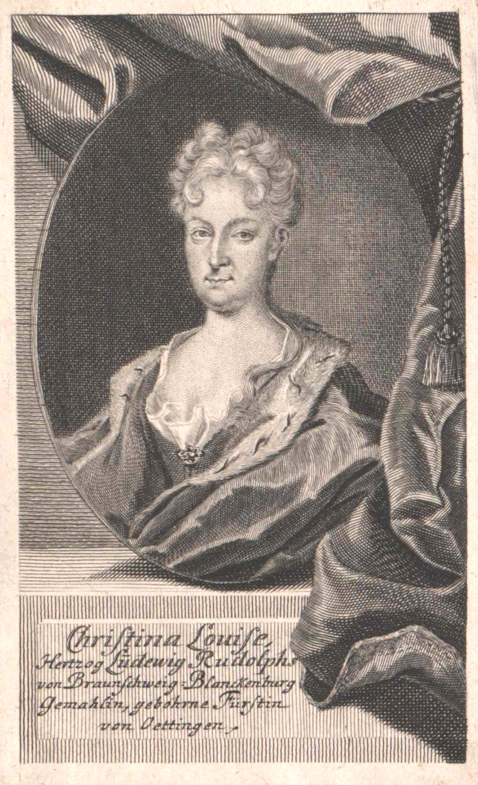 Christina Louise von Oettingen (1671–1747), Stich von Martin Bernigeroth